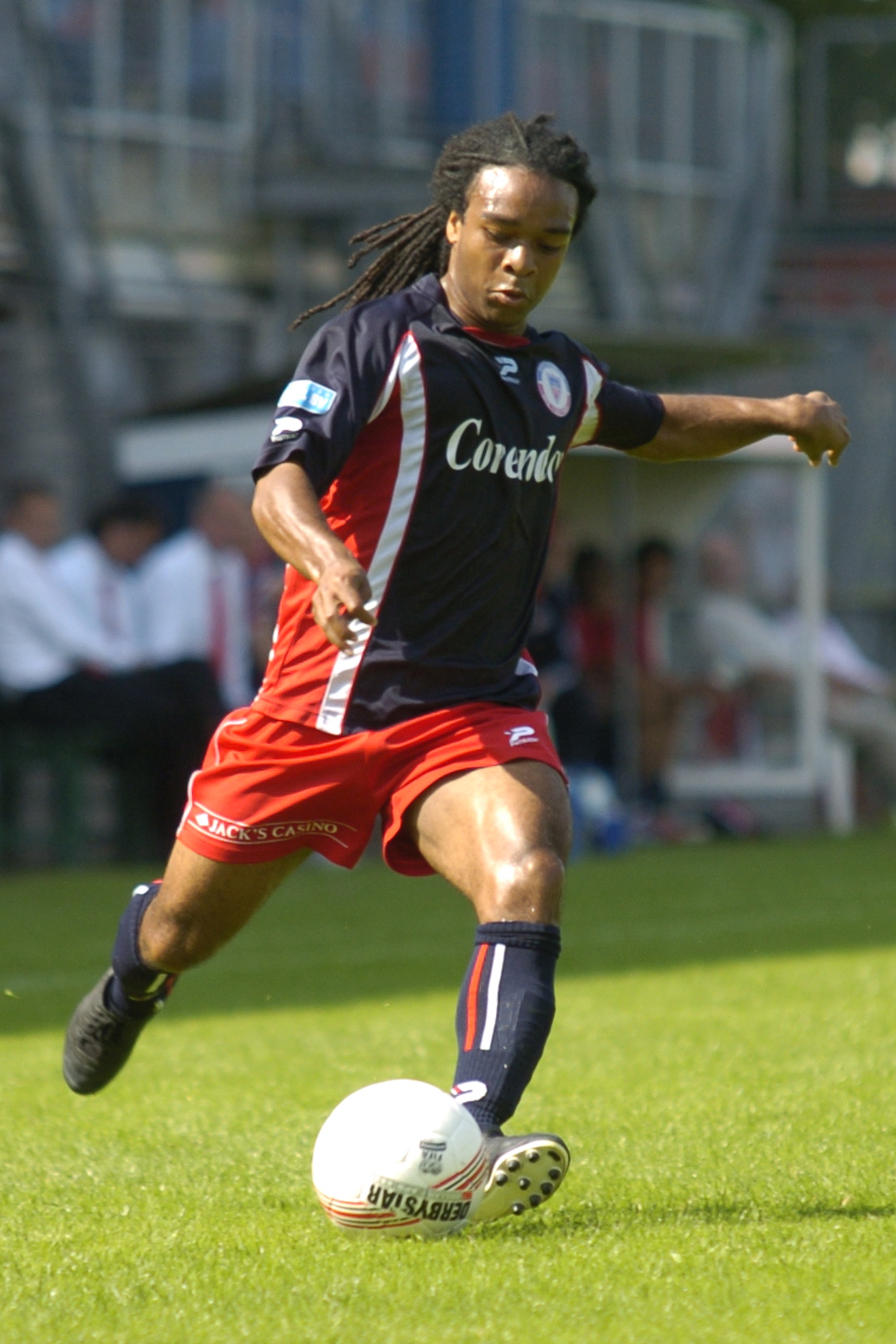 Marvin Wijks 31-8-2008 HFC Haarlem - SC Telstar 4-2